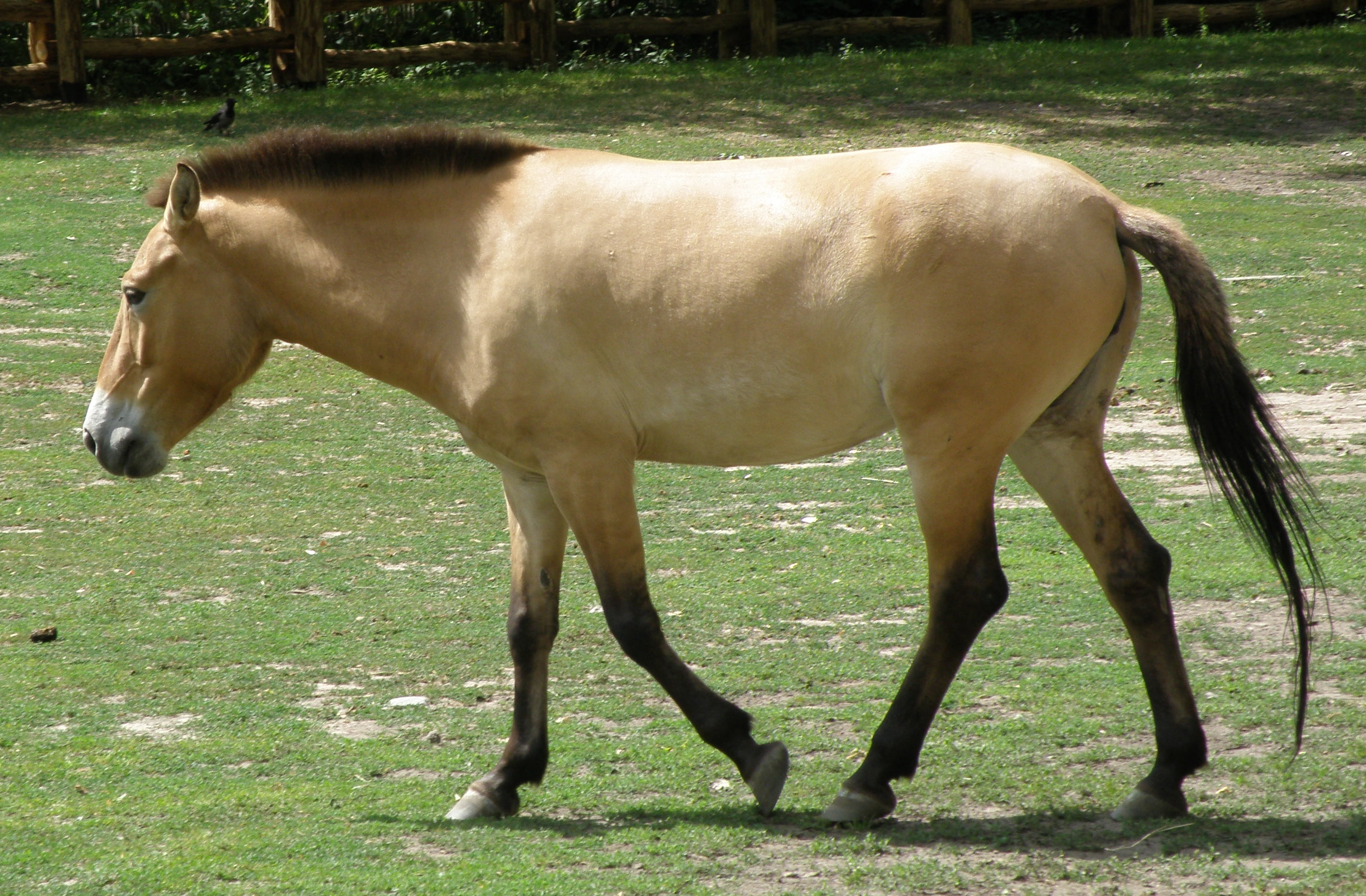 Koń Przewalskiego, Ogród Zoologiczny w Warszawie